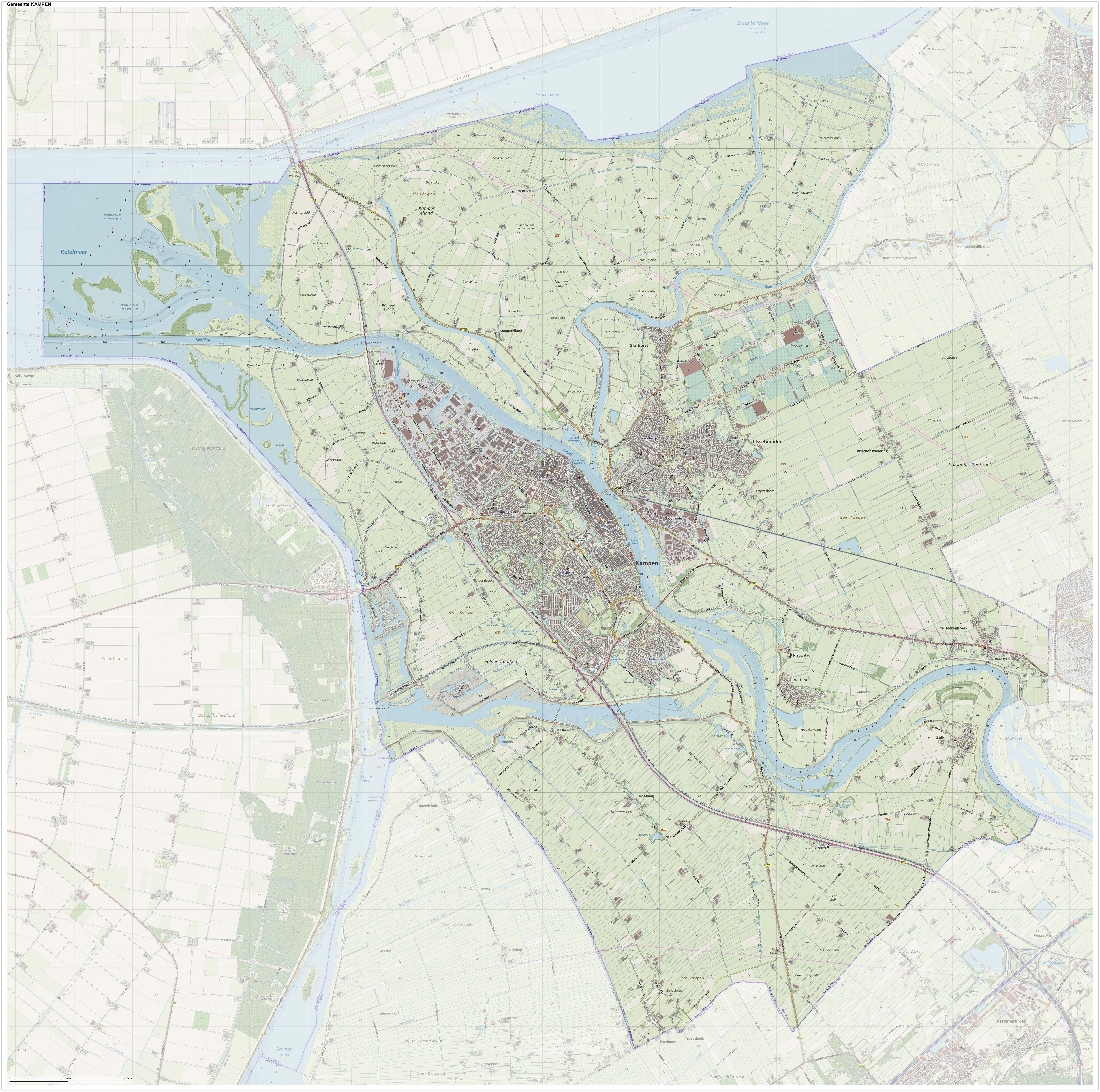 Topografische gemeentekaart. Resolutie: 400 pixels/km. Kaartbeeld samengesteld uit de open geodata van de Top10NL en Top25namen (Kadaster), Creative Commons-BY licentie. Gebouwvlakken uit open geodata BAG extract. Wegen uit de OpenStreetMap, OpenStreetMap community. Reliëfschaduw uit de Actuele Hoogtekaart AHN2. Samenstelling en kleurenschema: Jan-Willem van Aalst, met QGIS. Zie ook de Legenda.